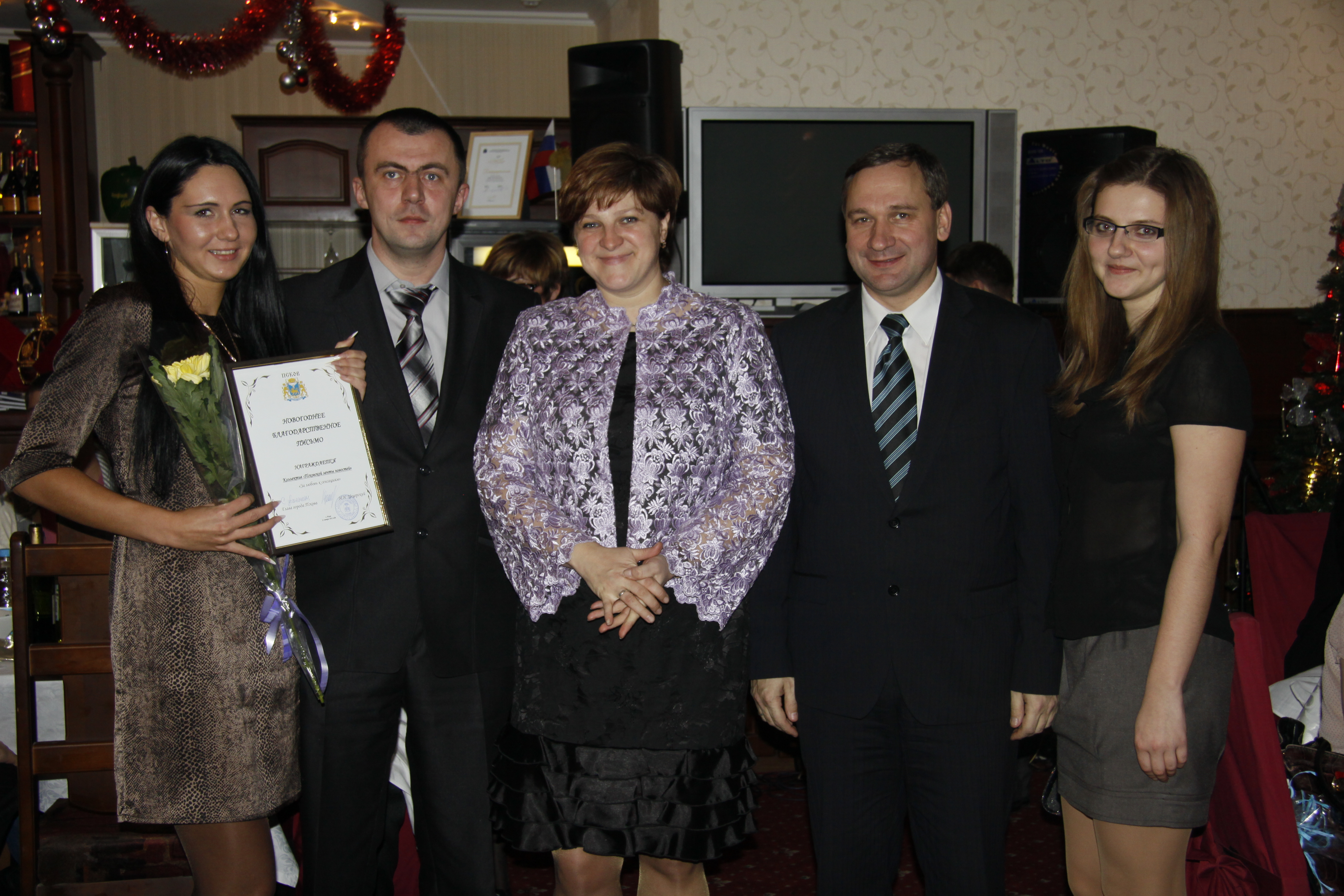 Сотрудники ЭПИ ПЛН на балу прессы вместе с главой Пскова Иваном Цецерским и его заместителем Наталией Соколовой